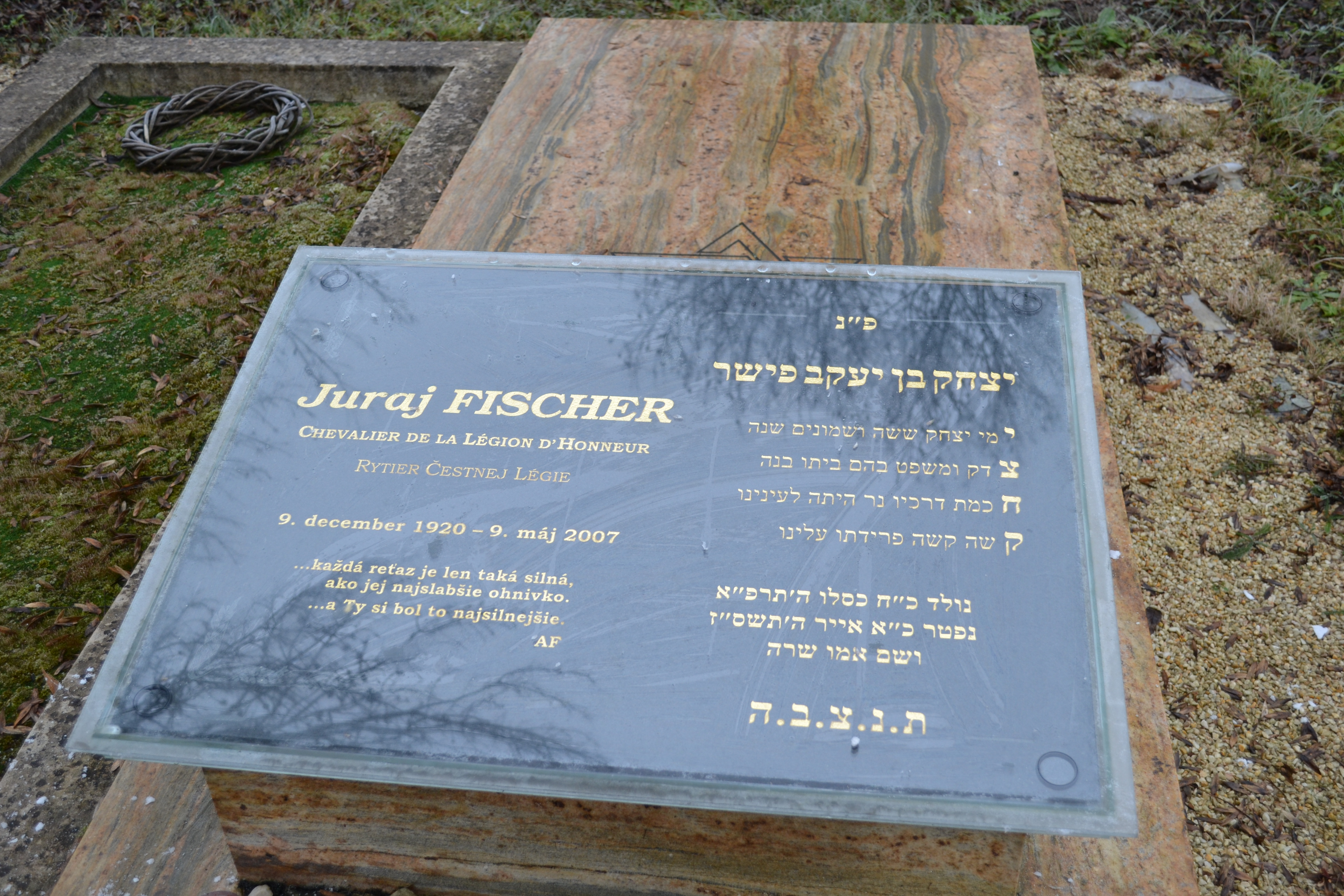 Grave, Juraj Fischer, Chevalier de la Légion d'honneur (1920 - 2007)